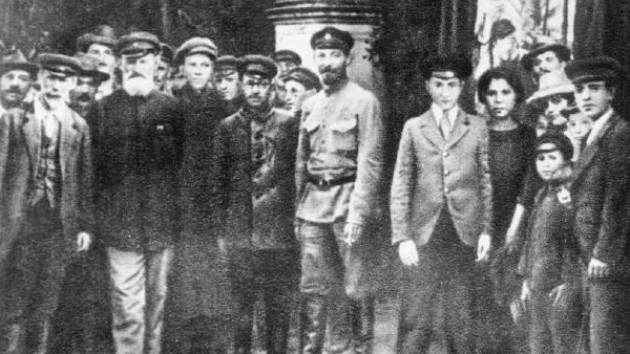 Феликс Дзержинский в польском городе Белостоке.